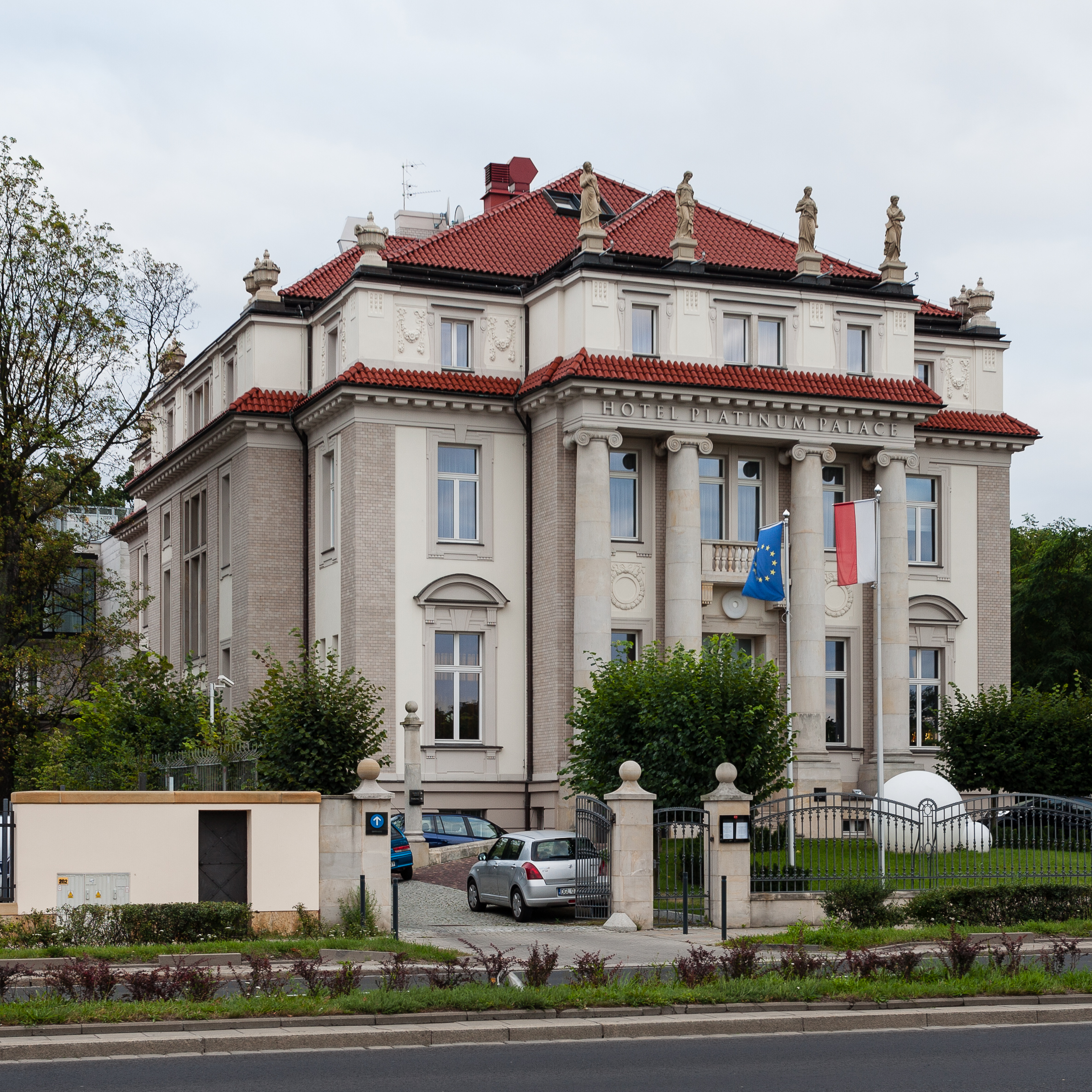 Pałac